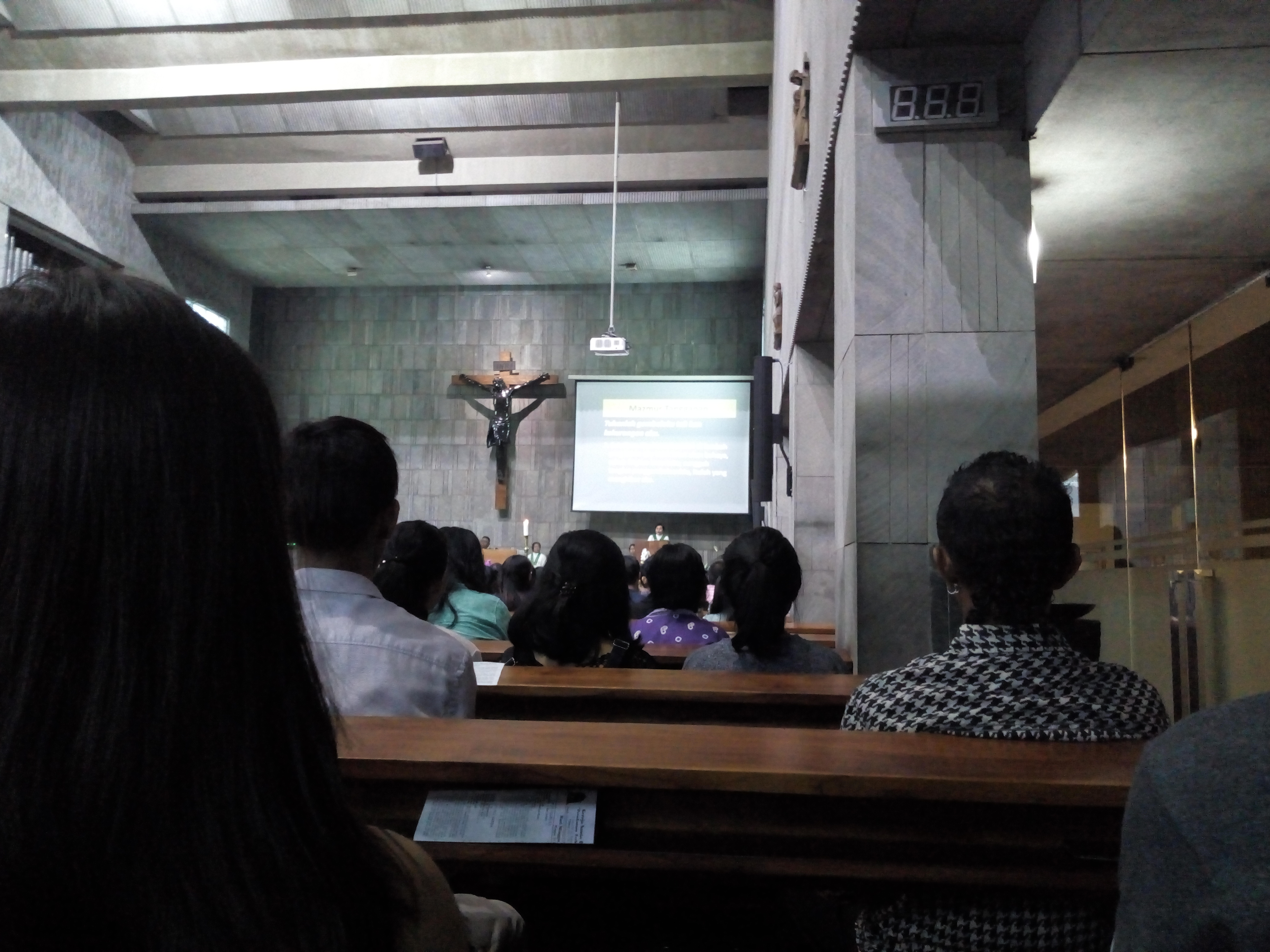 Misa Gereja Santa